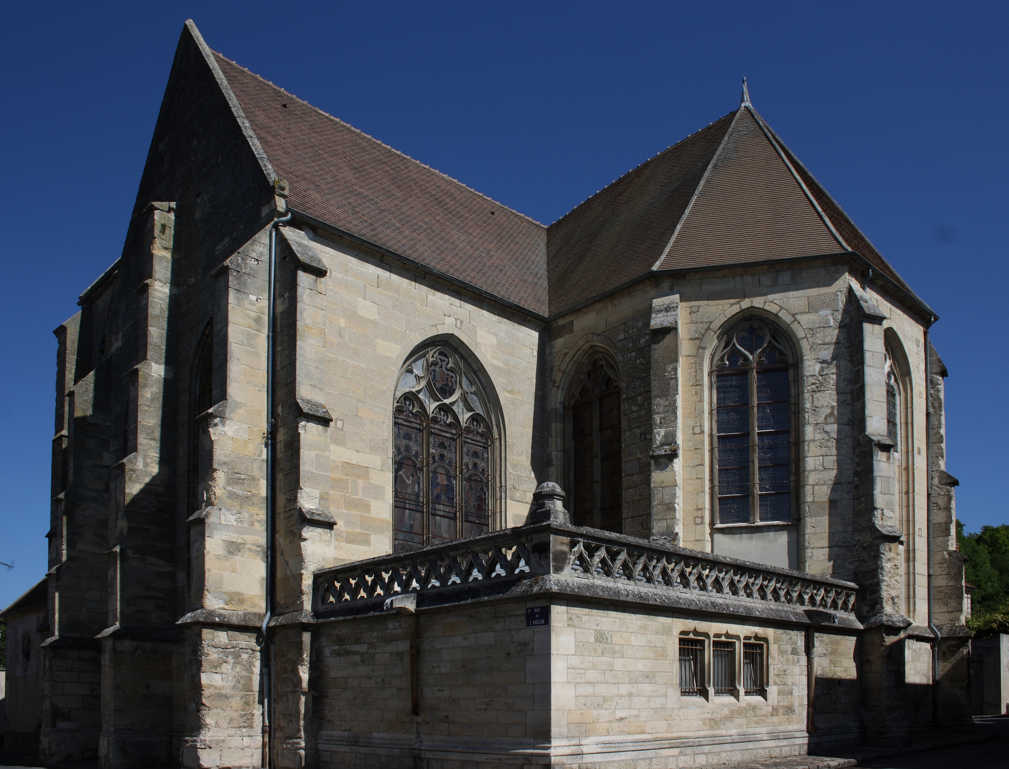 Kirche Saint-Cyr-et-Sainte-Julitte in Crouy-sur-Ourcq (Département Seine-et-Marne), im 16. Jahrhundert erbaut